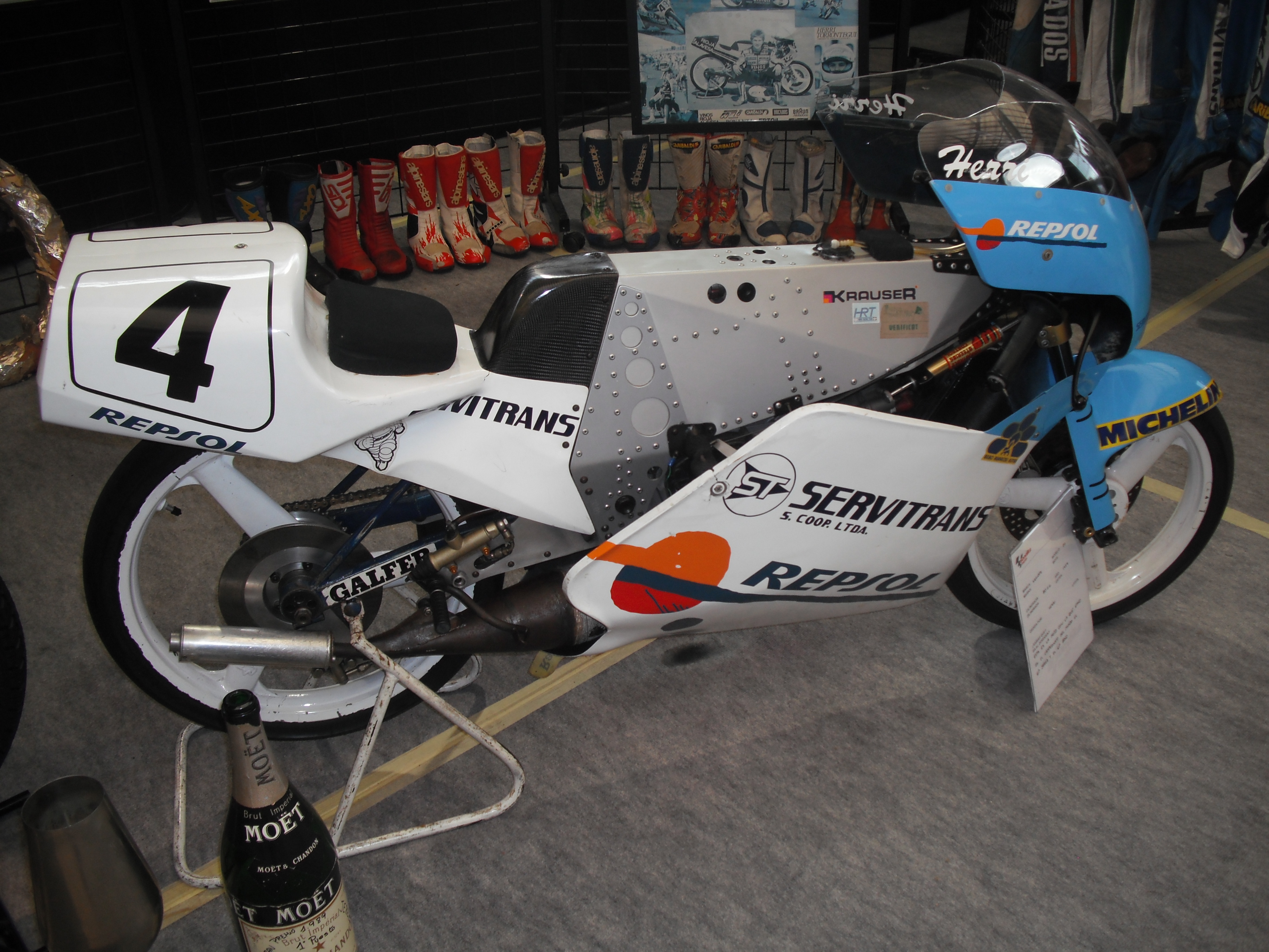 Krauser de 80 c.c. con la que Herri Torrontegui quedó cuarto en el Mundial de Motociclismo de 1989